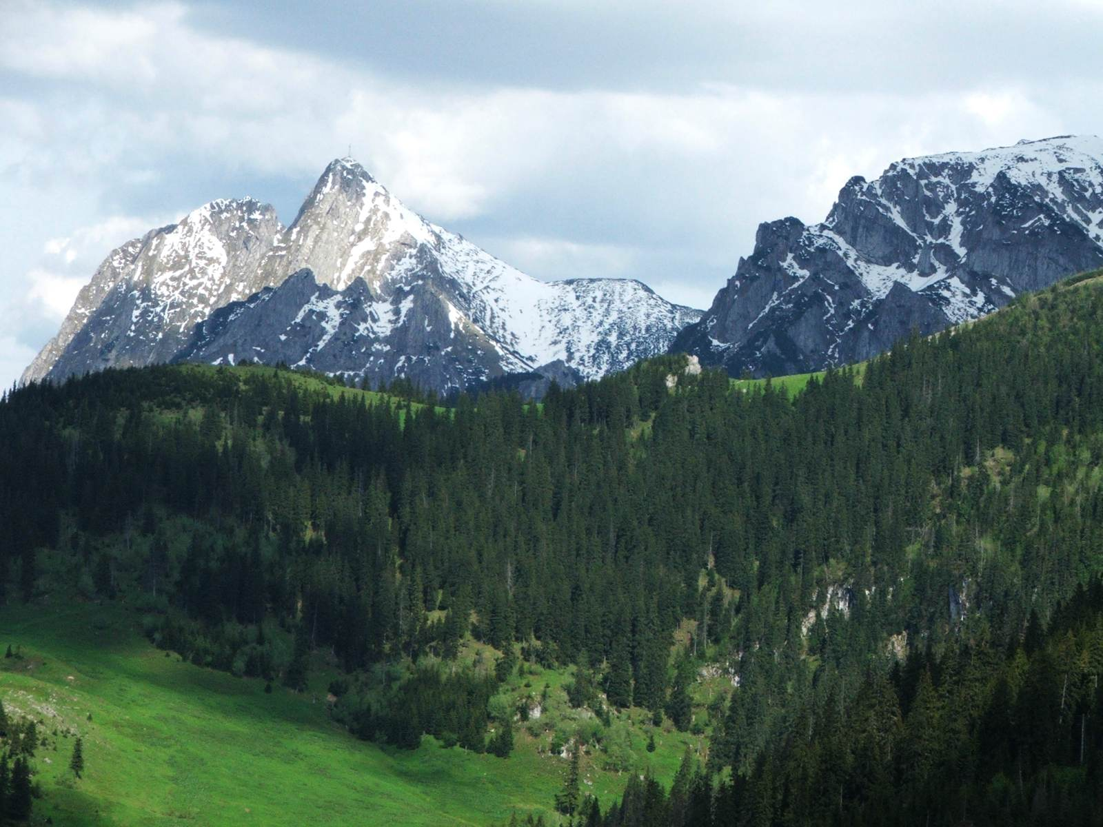 Giewont, Wielka Turnia